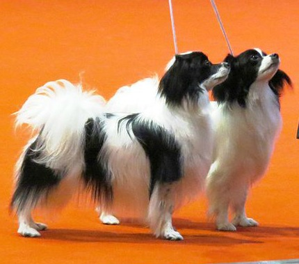 Riga, Baltic Winner-2013, 9-10 Nov